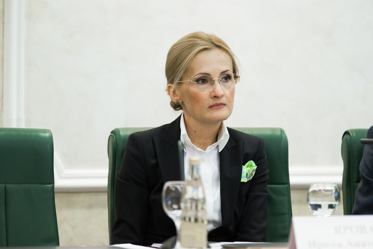 Председатель комитета ГД по безопасности и противодействию коррупции Ирина Яровая Парламентские слушания на тему «Уголовная политика в Российской Федерации: проблемы и решения»